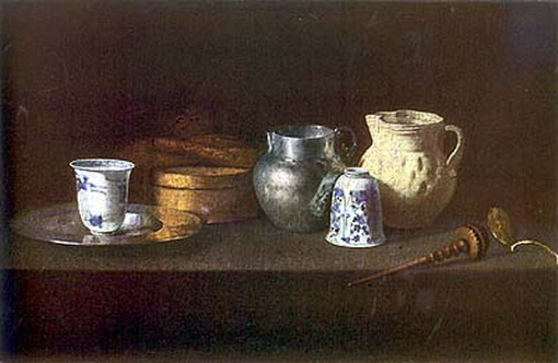 Хуан де Сурбаран. Посуд і мнин для приготування шоколаду. 1640